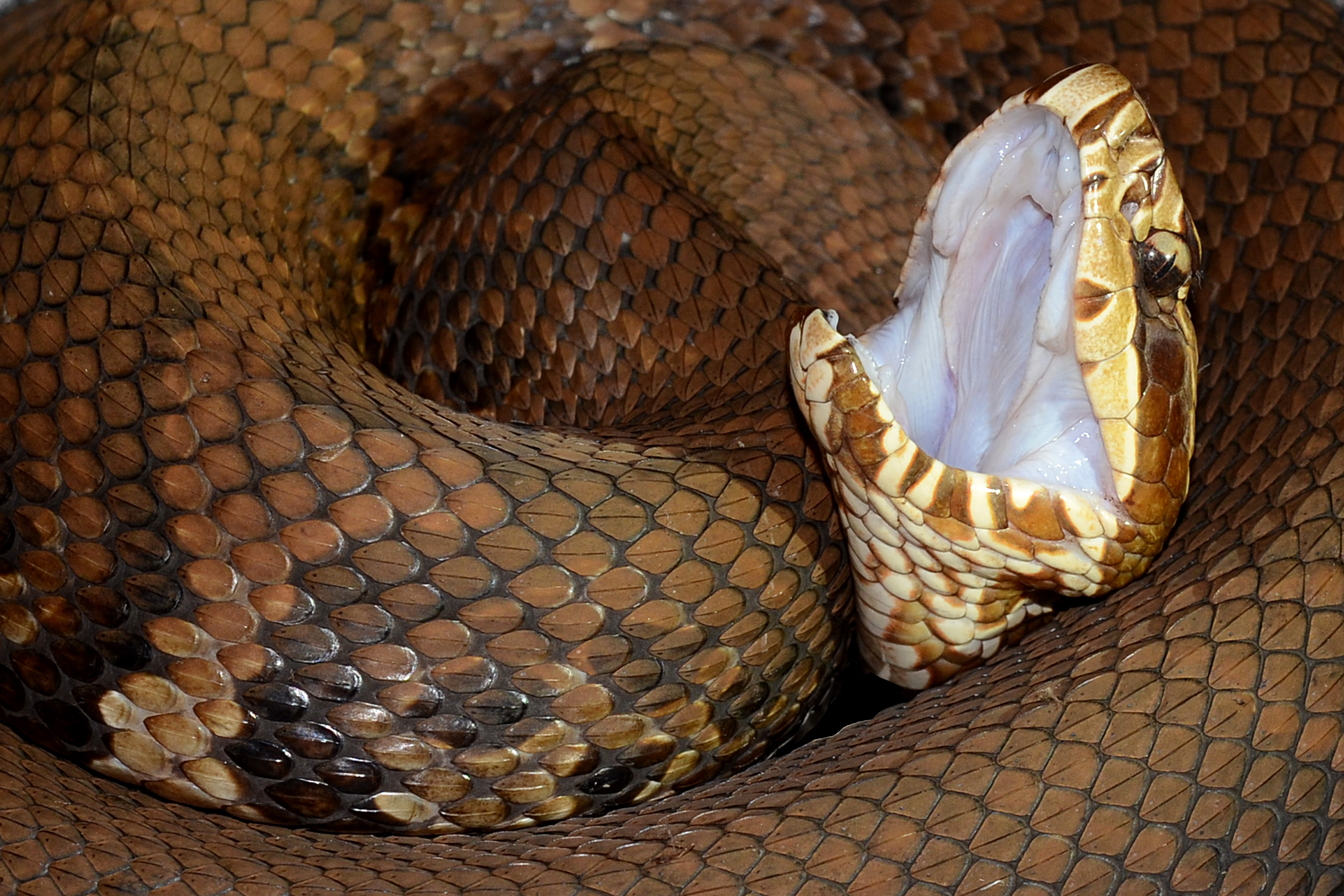 Viperidae: Agkistrodon piscivorus North-central Florida